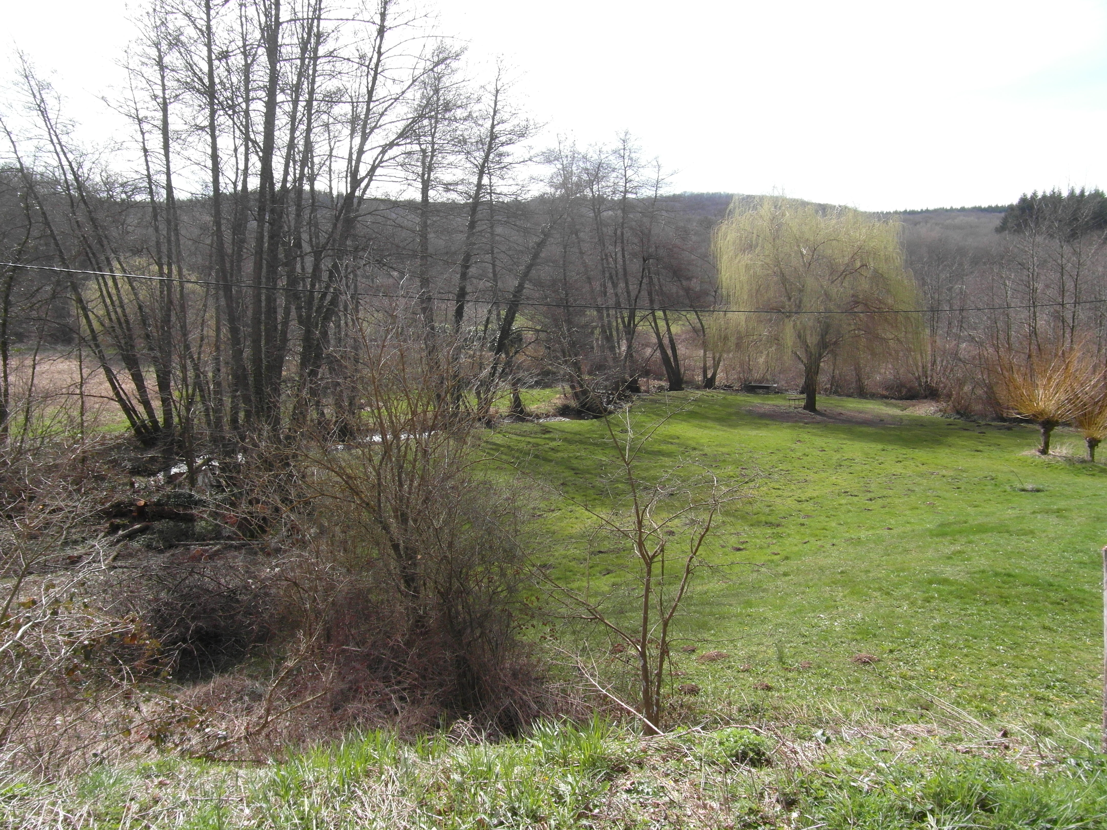 La Gève en forêt de Bonnevaux en mars 2019